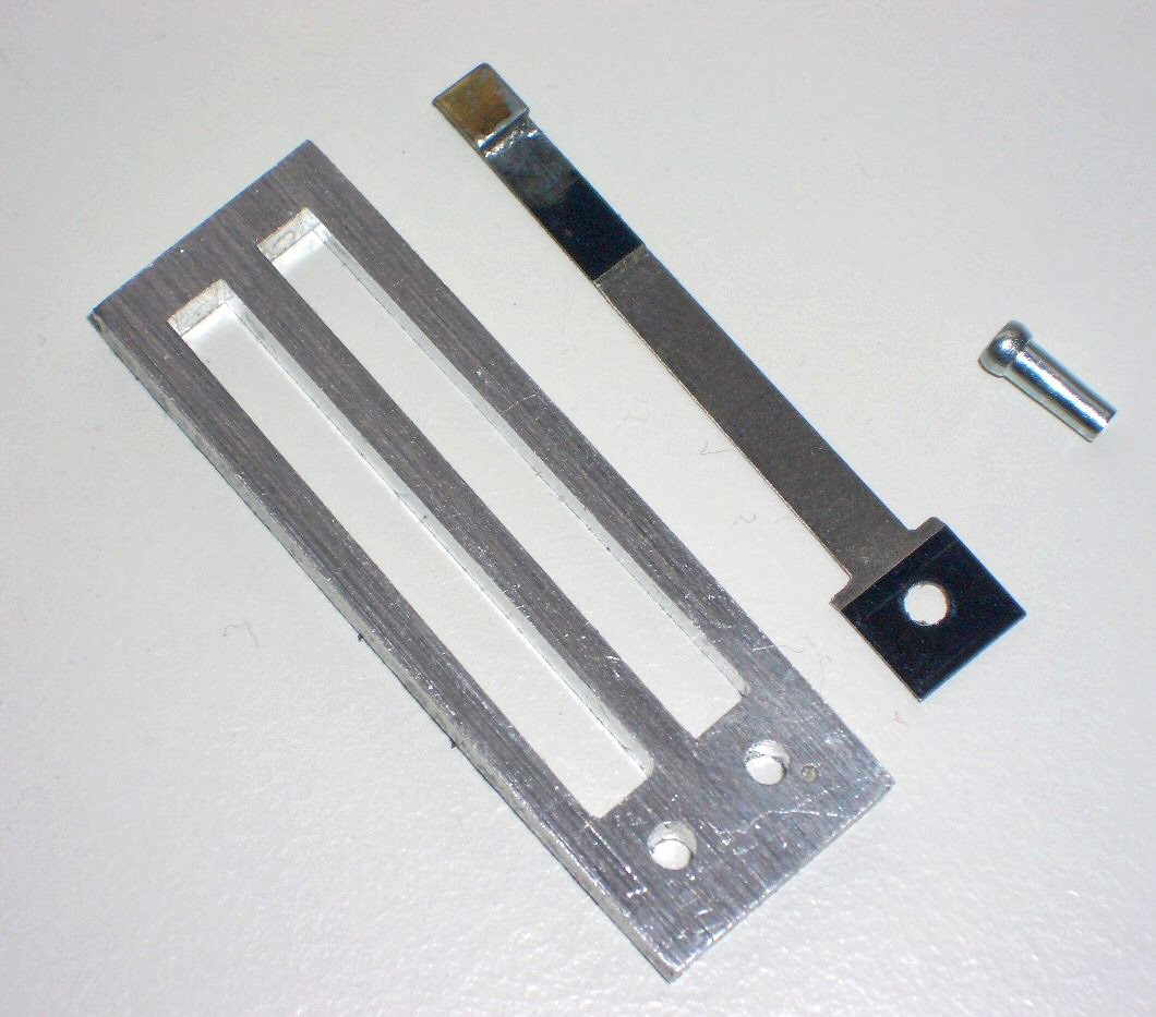 Antonelli Diskantstimmplatte in Einzelteilen Tonhöhe A 220 Hz andere Versionen: ... Möglichkeiten zur Lizenzierung, bitte die nicht-benötigte Variante aus dem Code löschen